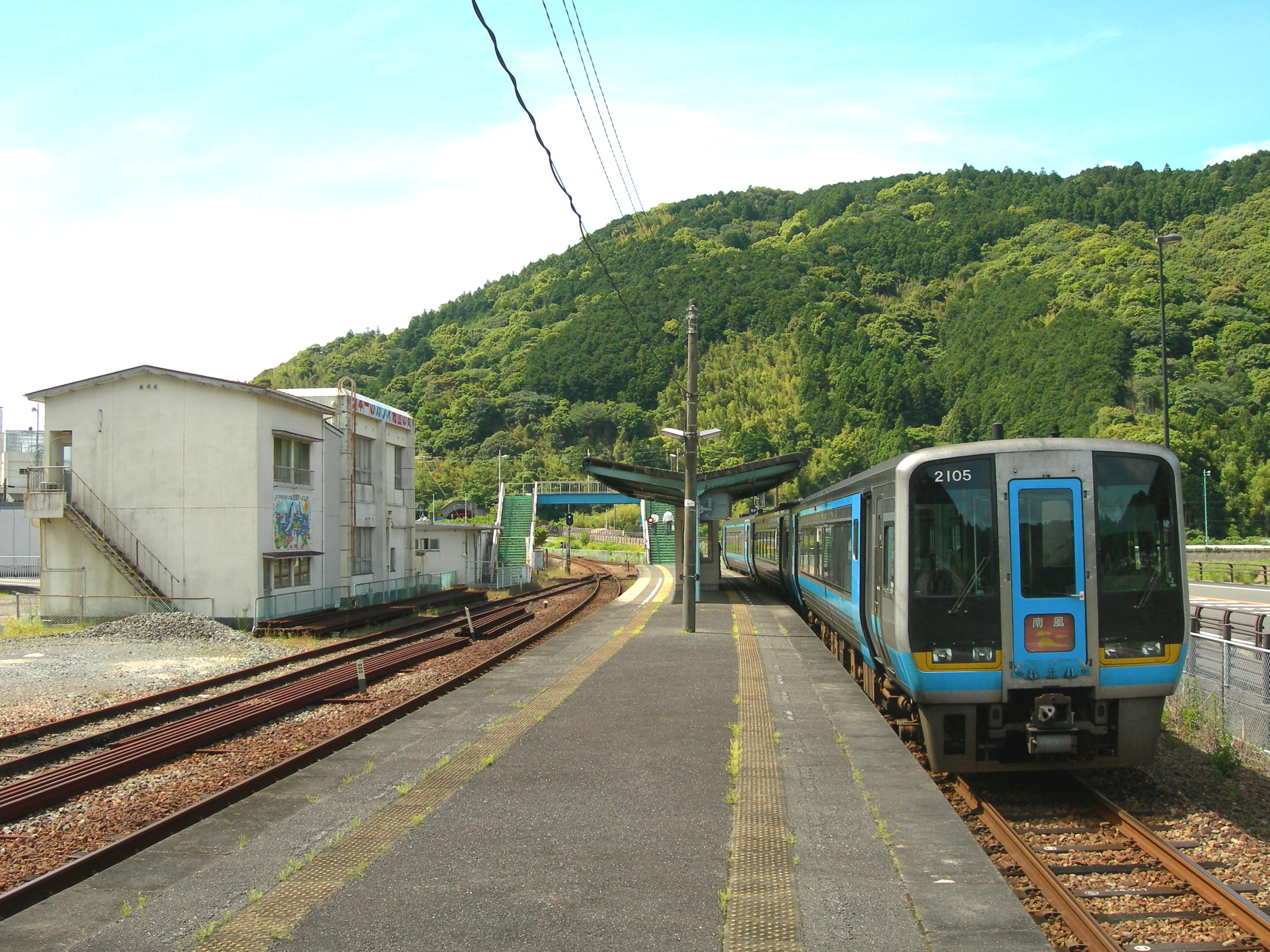 土佐佐賀駅ホーム